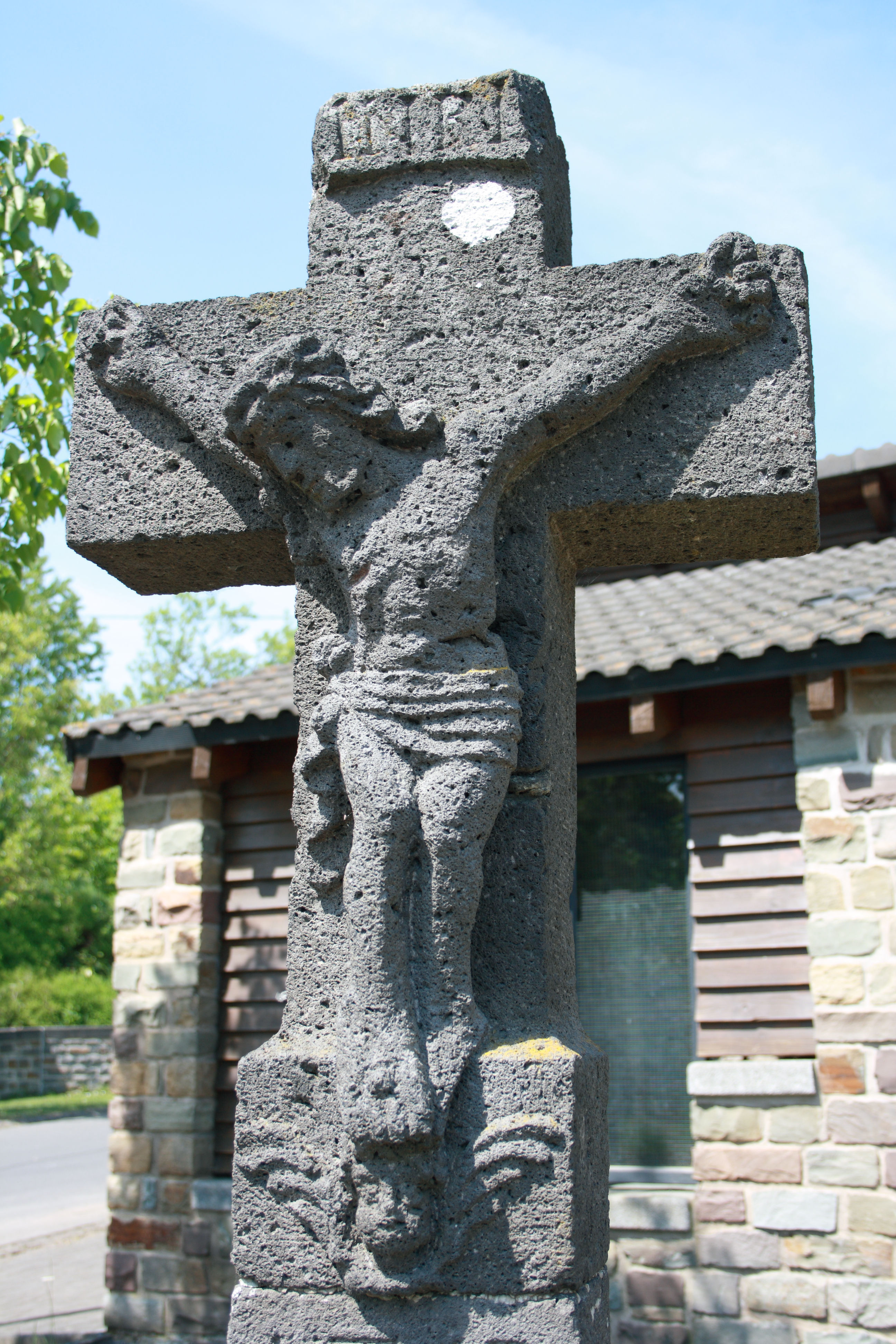 Hauptstraße/Ecke Bergstraße: Wegekreuz; Schaftkreuz, Basalt, bezeichnet 1762 in Sarmersbach